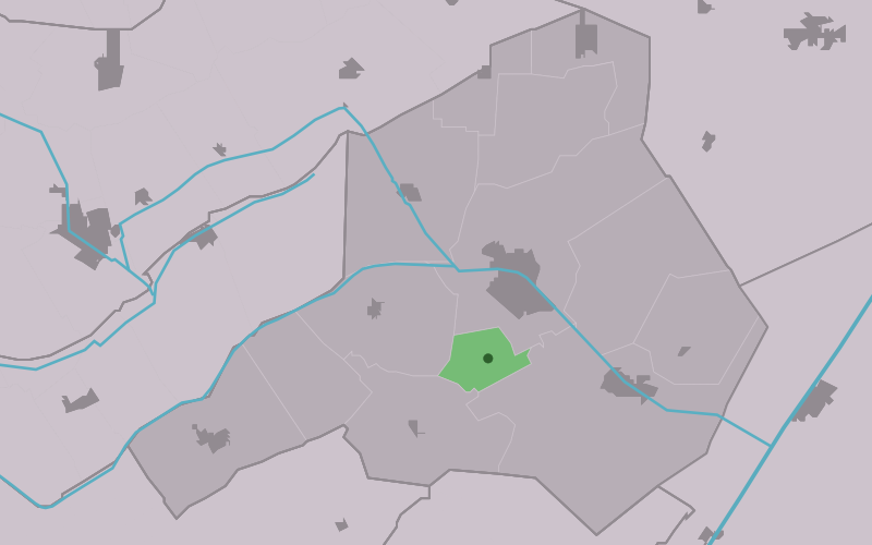 Kaartsje fan himrik fan Langedike